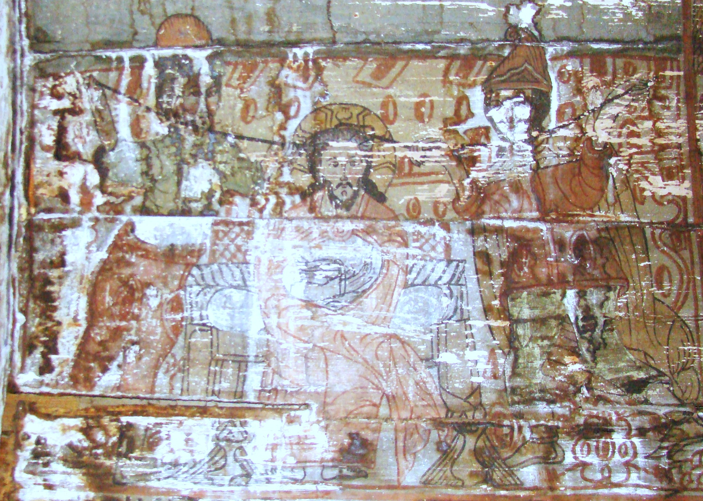 Biserica de lemn din Someșu Rece, județul Cluj